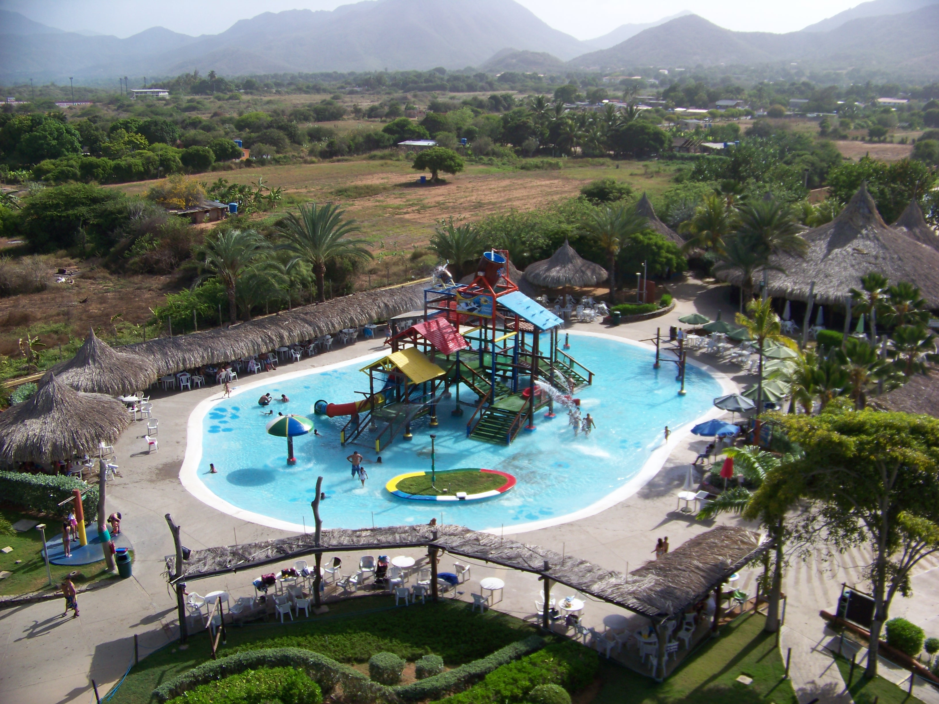 Parque el Agua, Isla de Margarita